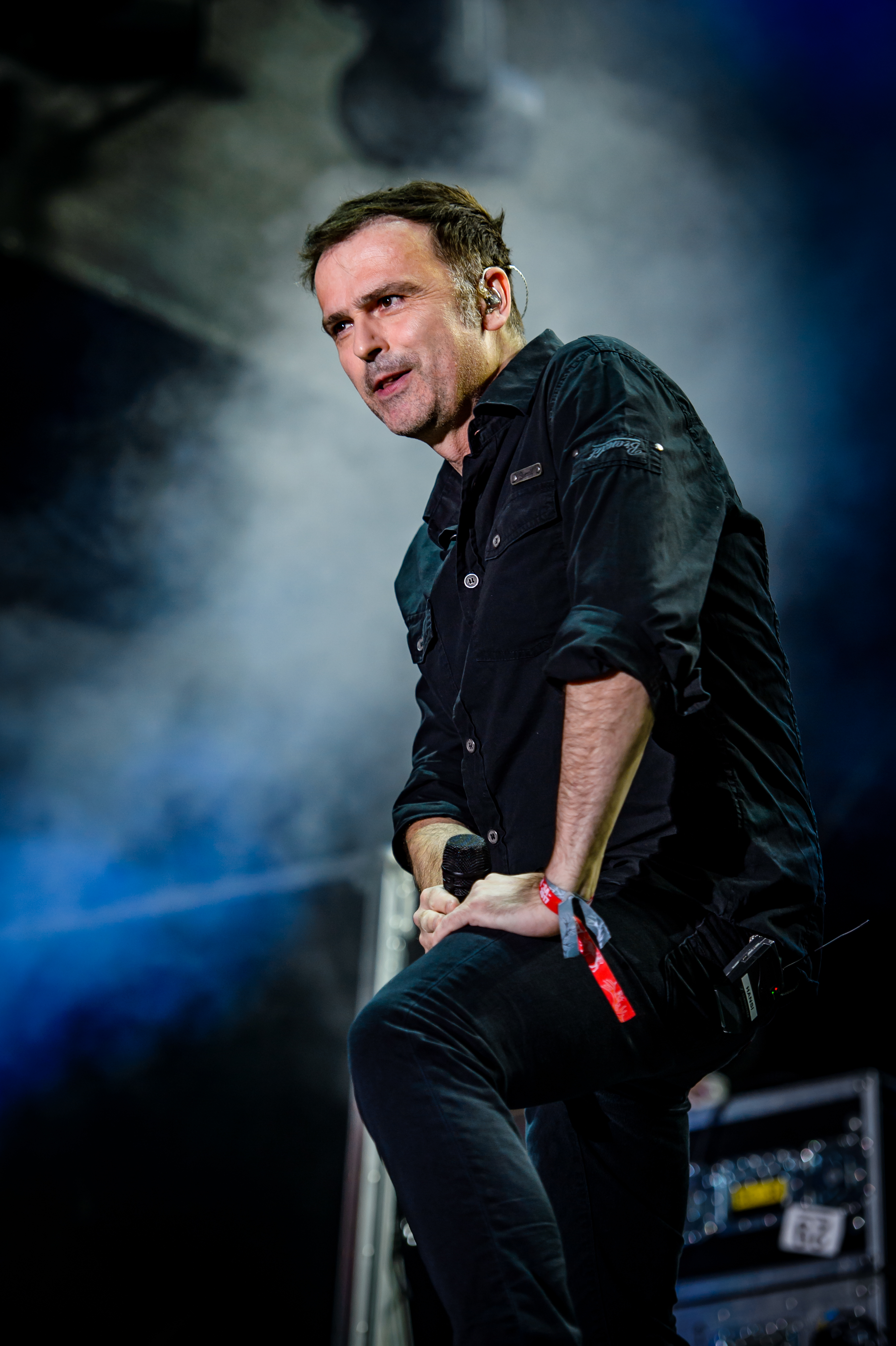 'RockHarz Open Air 2017; Ballenstedt': 'Blind Guardian'